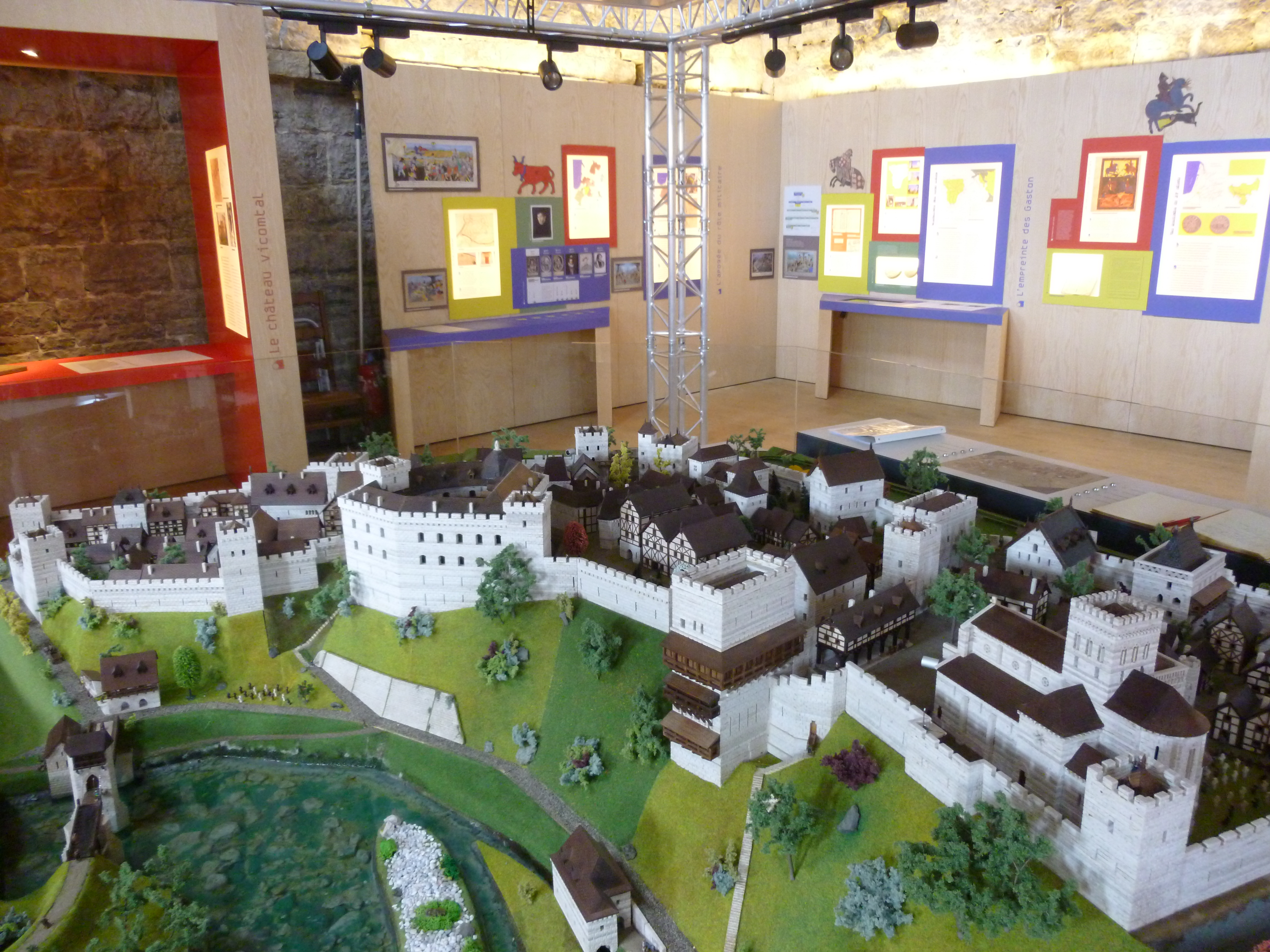 Maquette de la cité médiévale de Sauveterre-de-Béarn qui se trouve dans la Tour Monréal.